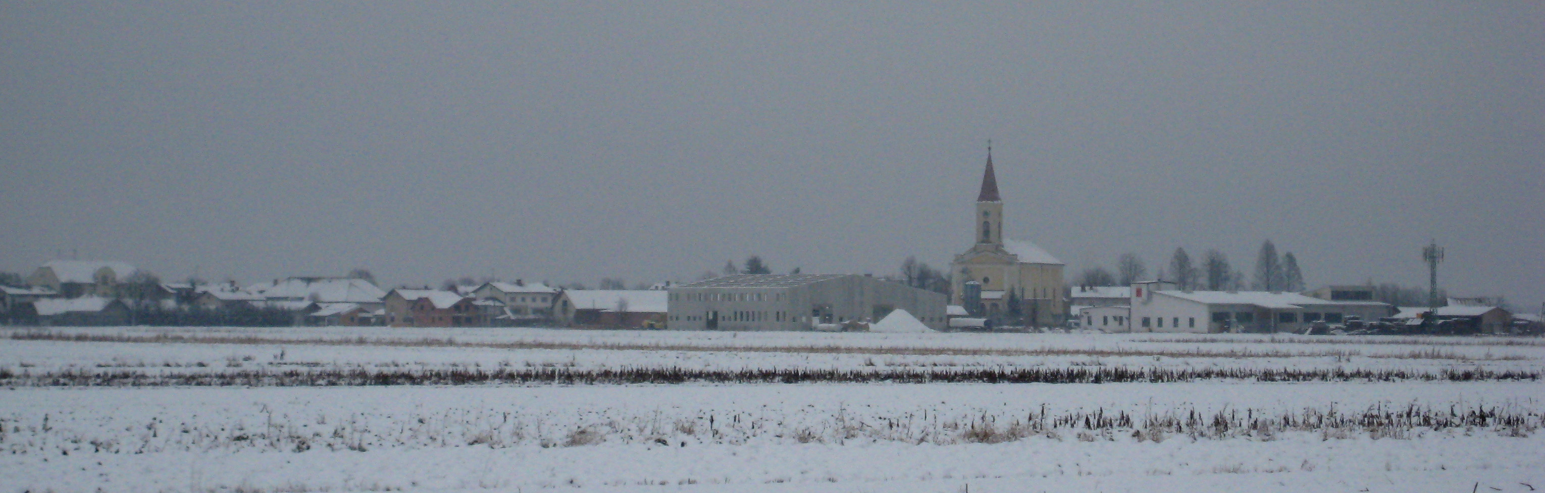 Črenšovci, village in Prekmurje, Slovenia